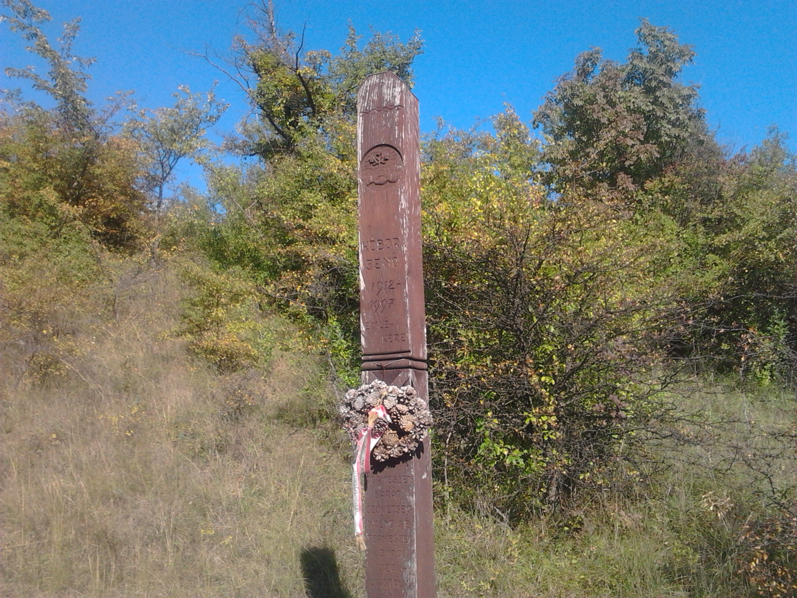 Kóbor Jenő kopjafája a Római út mentén a Dunaalmási Kőfejtők Természetvédelmi területen.